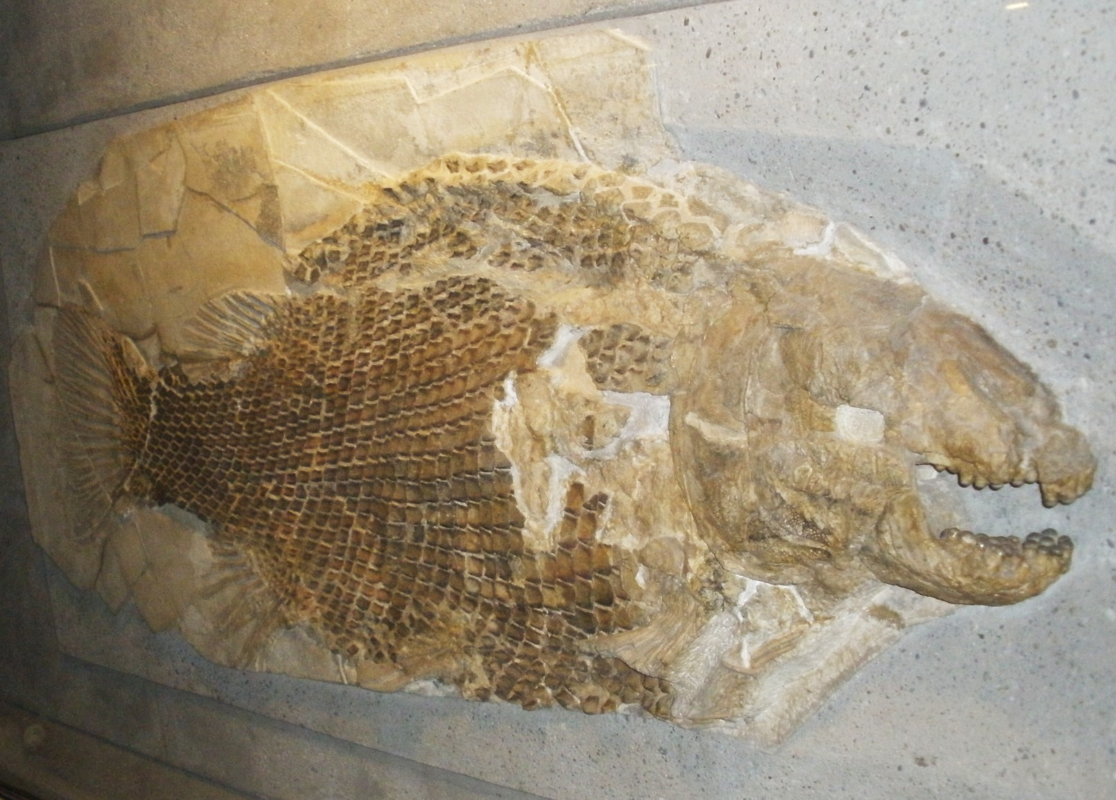 Fossil of Lepidotes, an extinct fish- Took the photo at Senckenberg Museum of Frankfurt